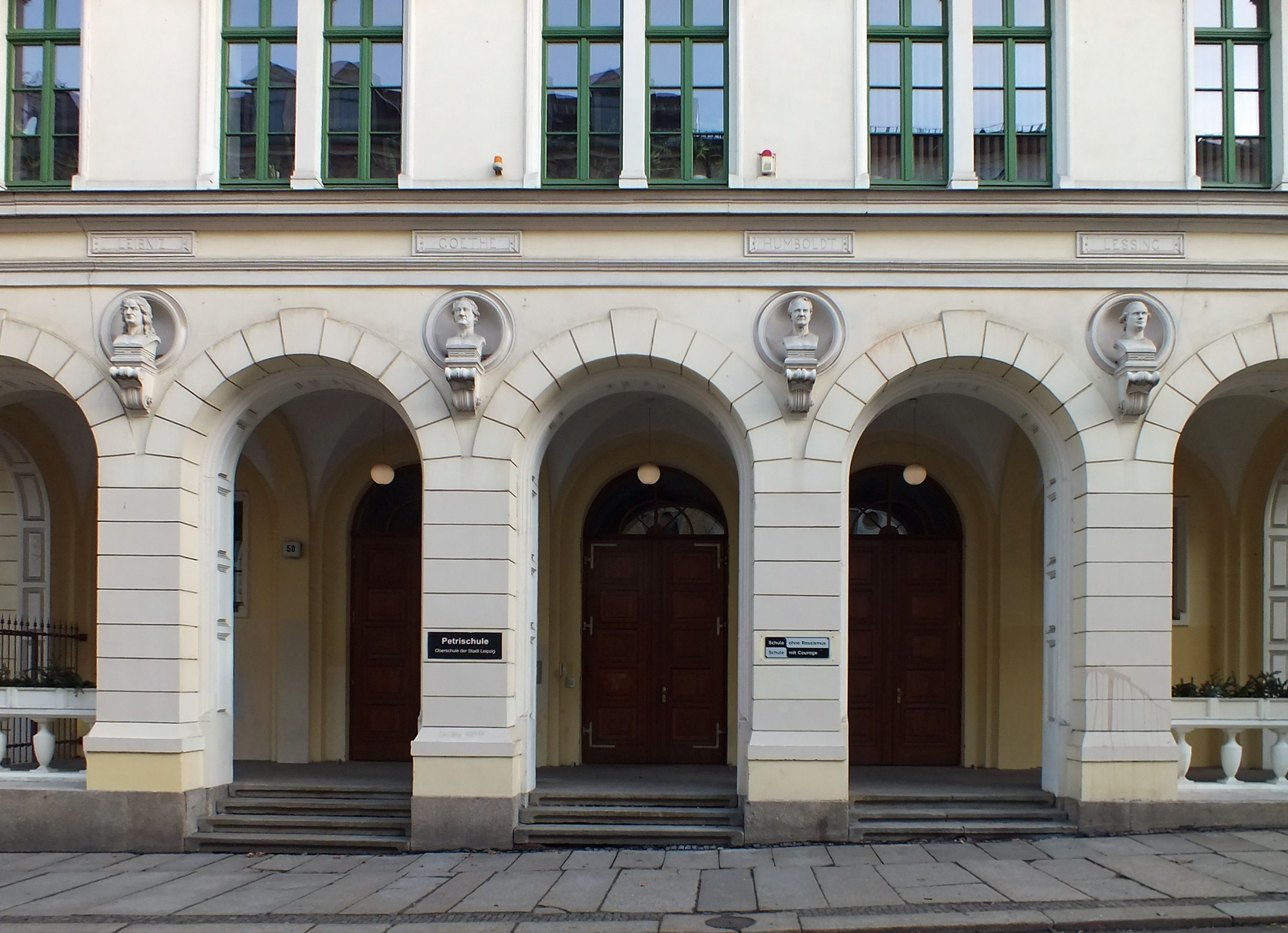 Der Eingangsbereich der Petrischule in Leipzig